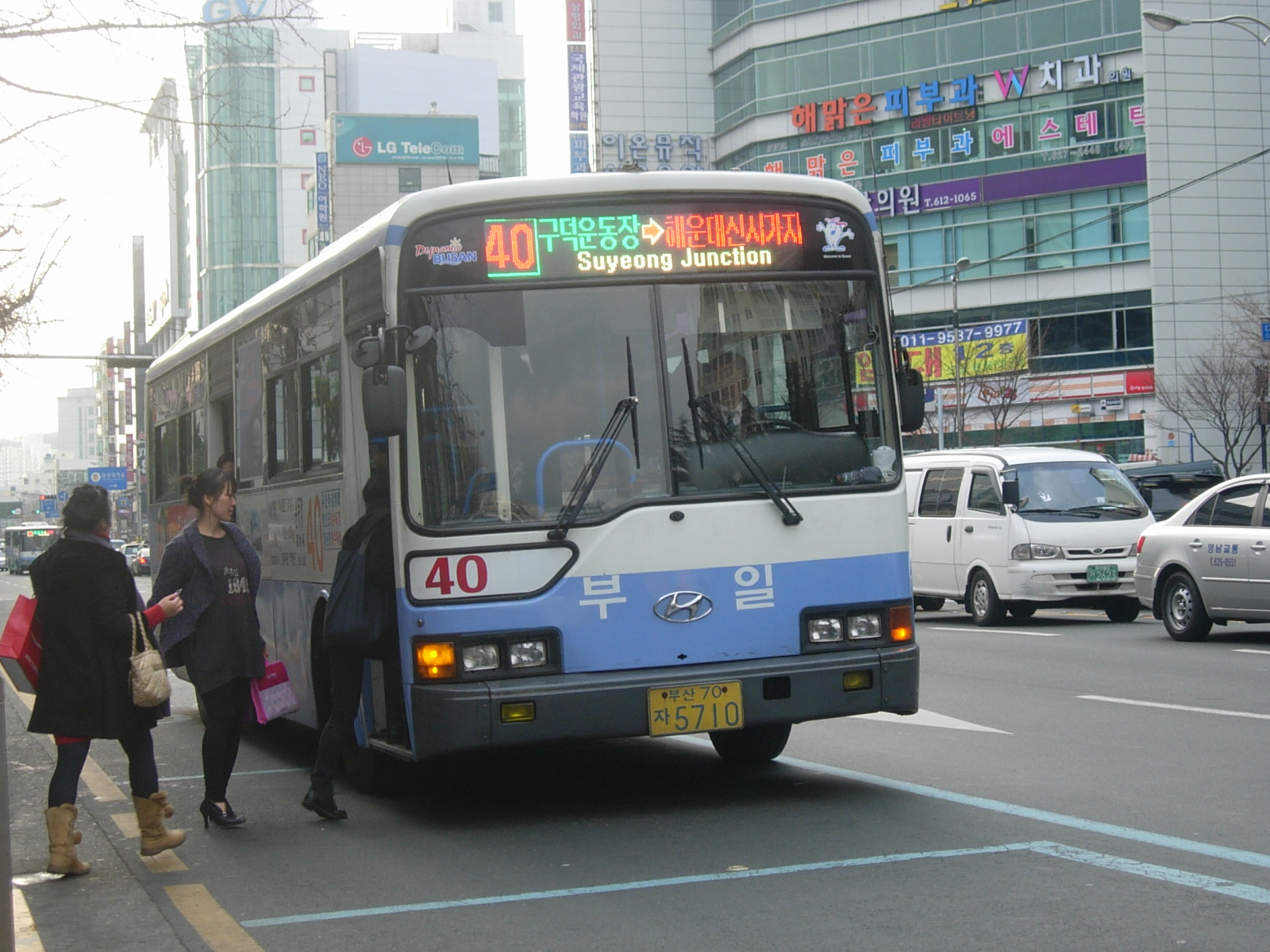 부산시내버스 40번 (장소: 구.남부경찰서 정류장)